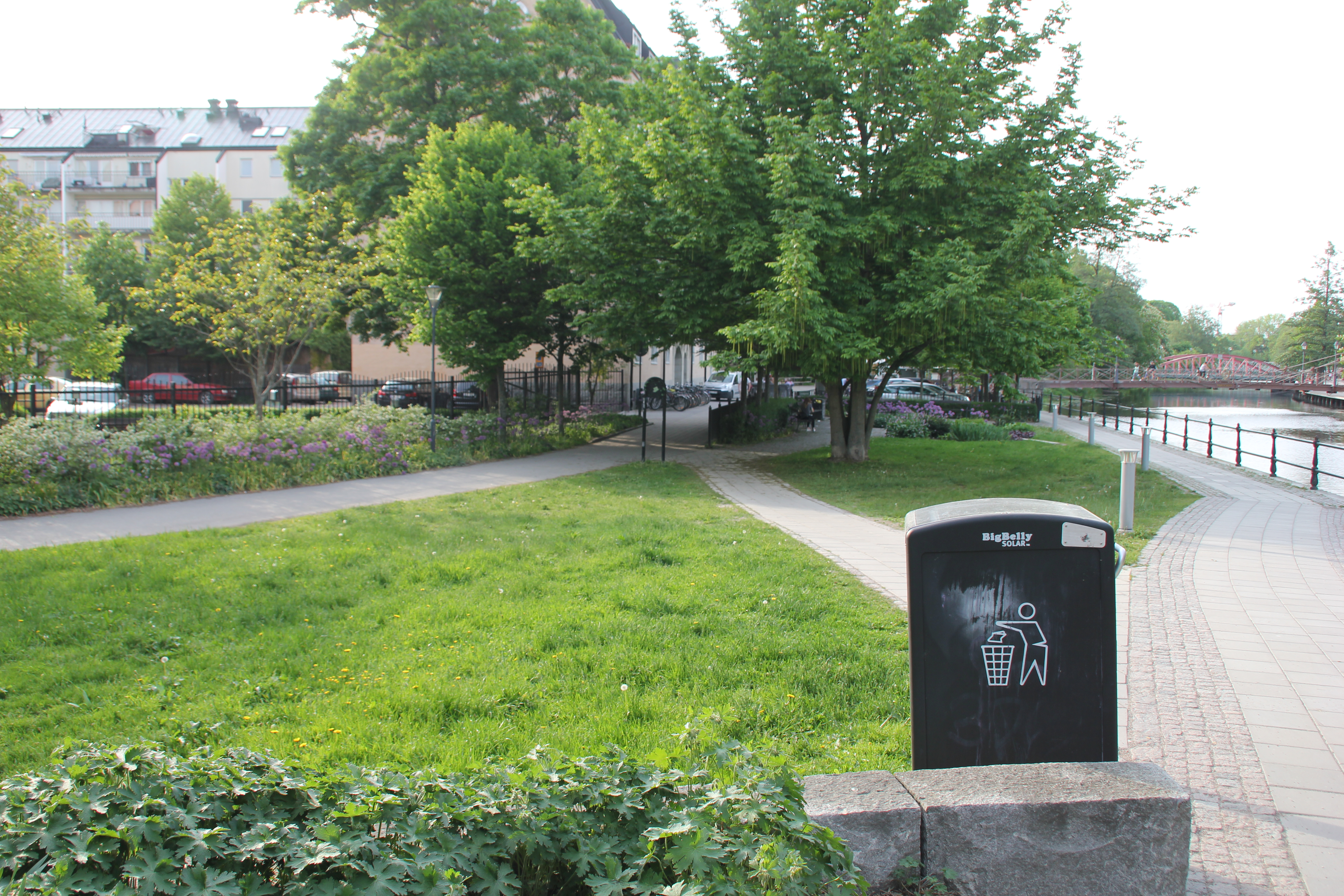 Artedi park, 2016